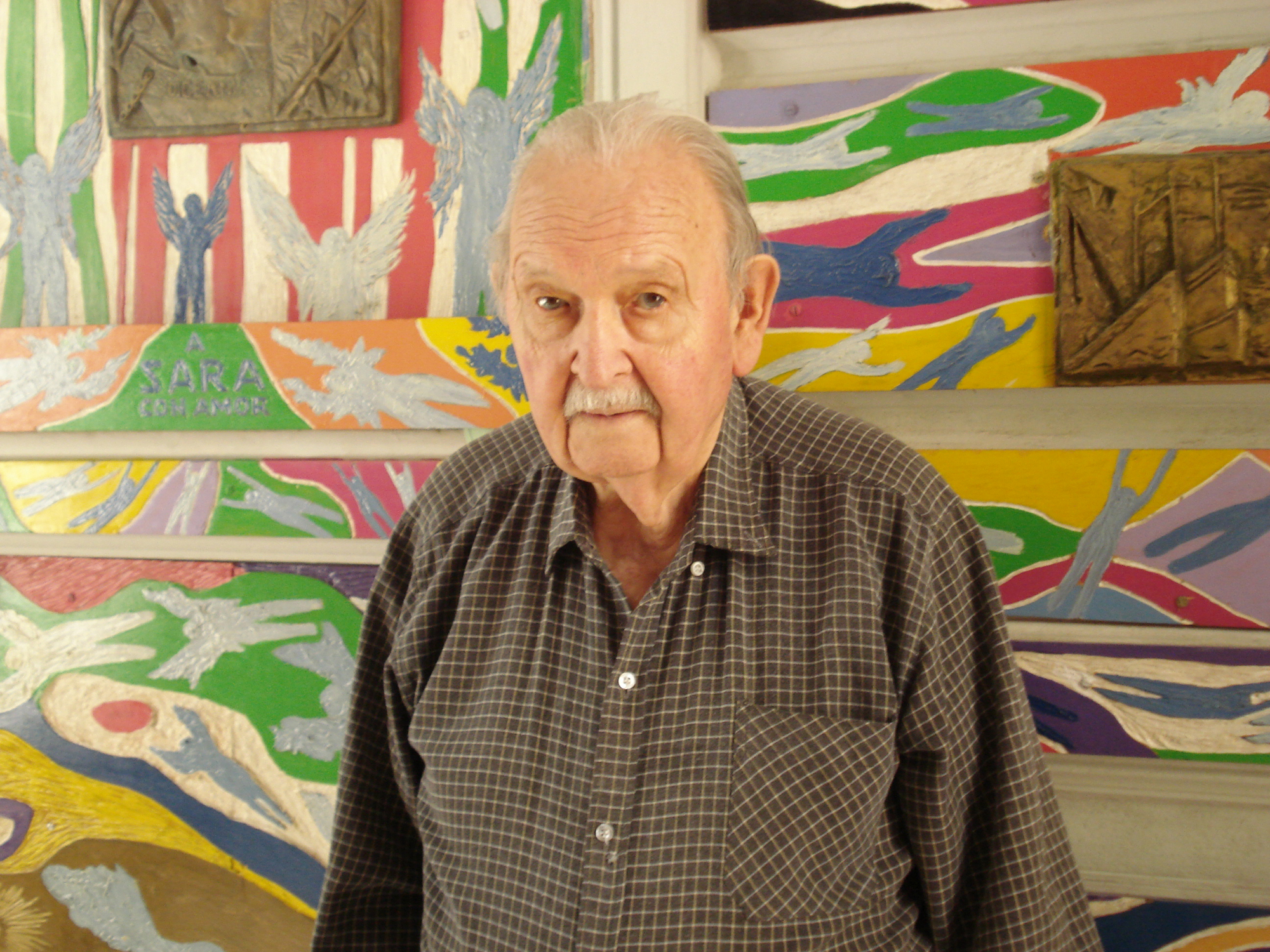 Retrato de Albino Fernández en su casa.